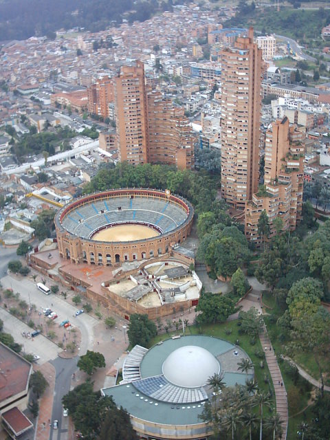 Santamaria bullring and planetarium in Bogota